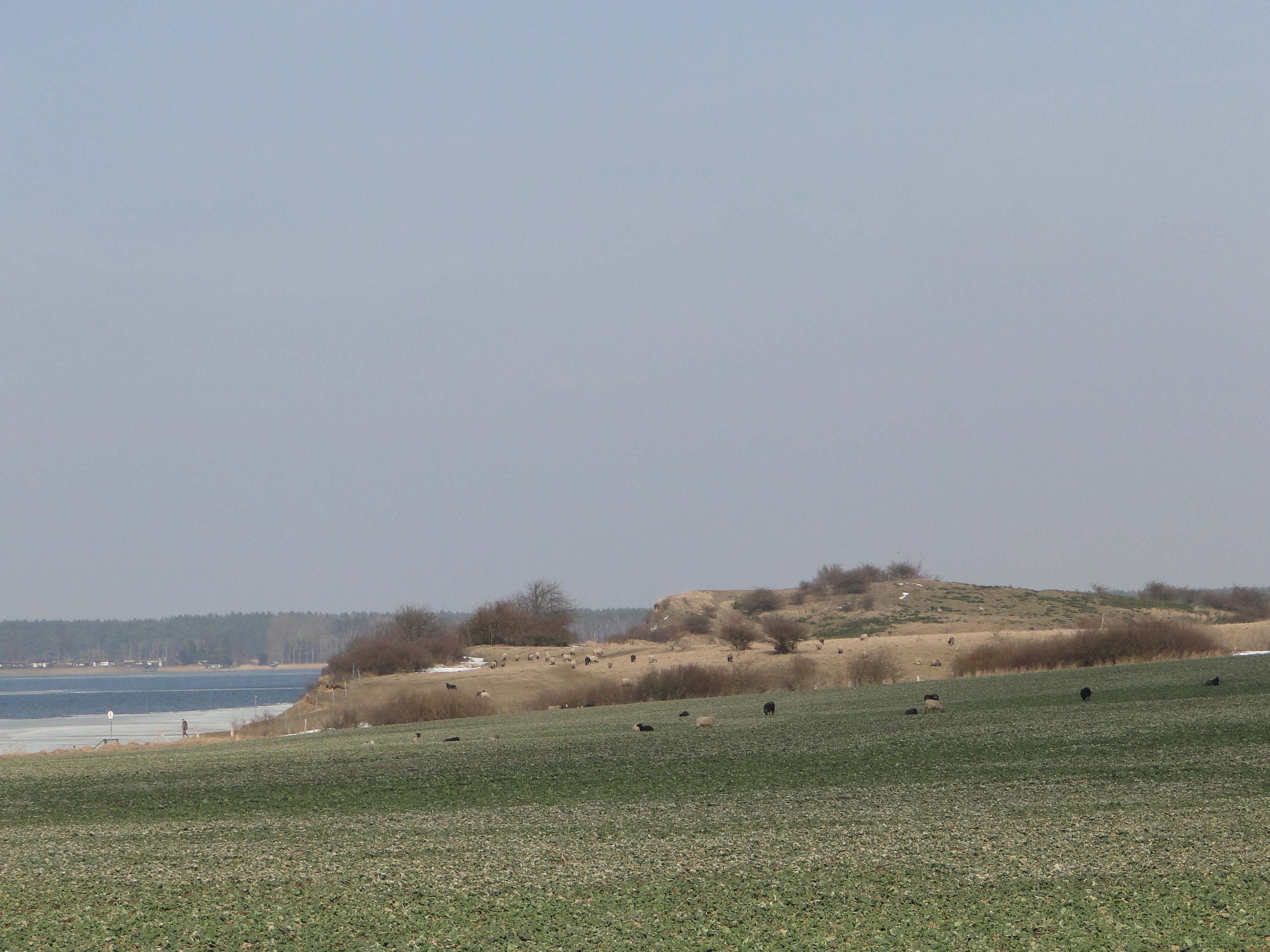 Blick von West auf das Naturschutzgebiet Devin, Mecklenburg-Vorpommern. - OpenStreetMap(Info)